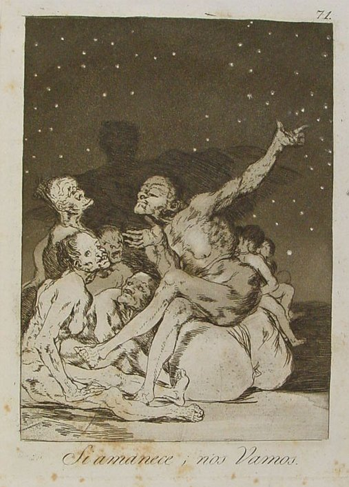 Capricho nº 71: Si amanece, nos vamos de Goya, serie Los Caprichos